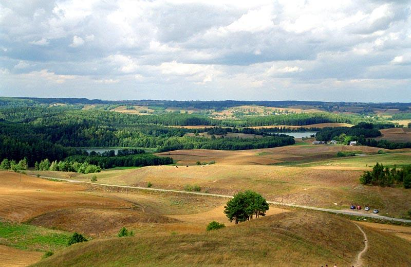 Mazuria form Gora Cisowa in Podlasie (Poland)